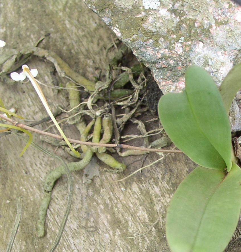 Racines verte, recouvertes de velamens